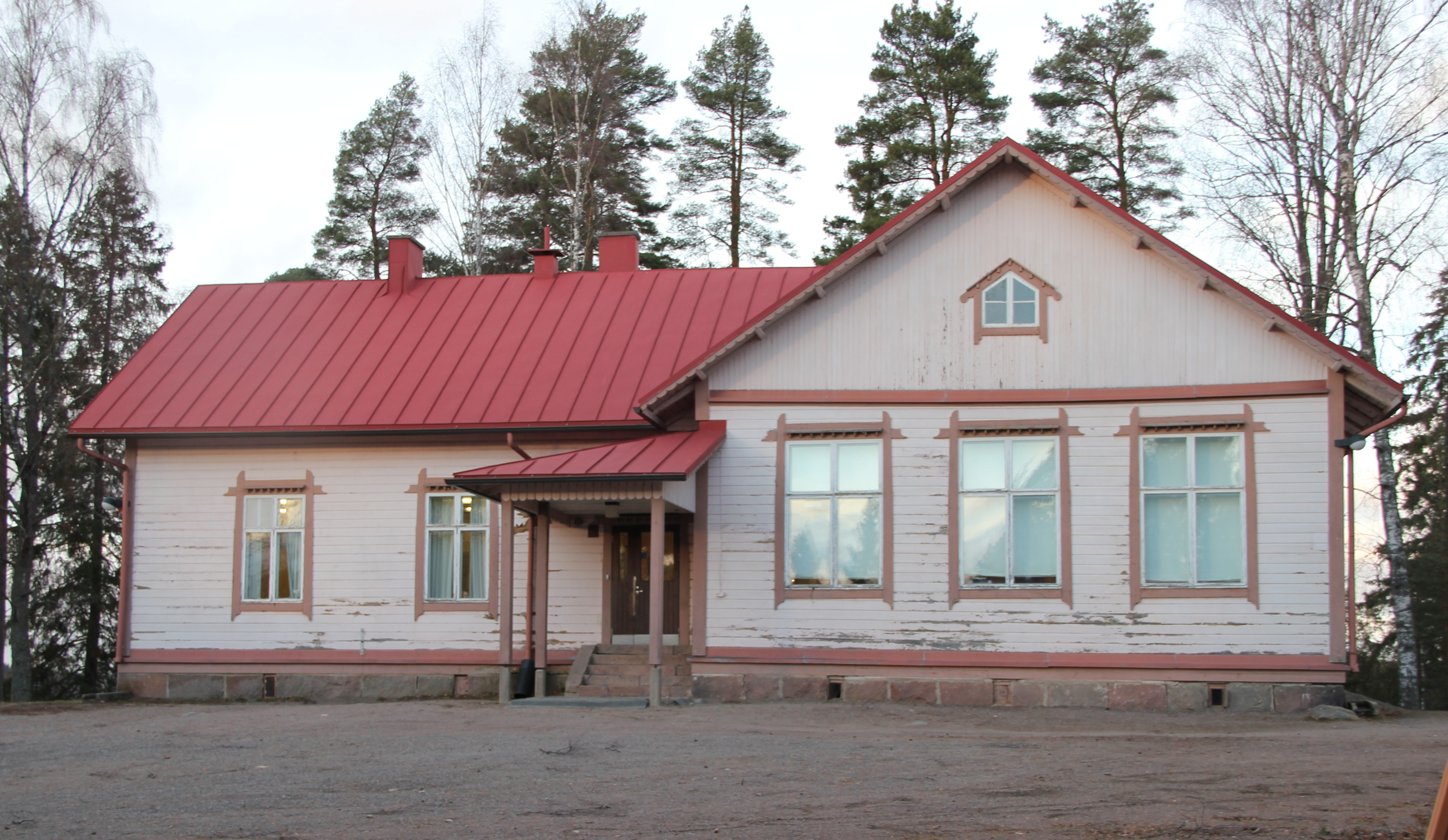 Koisjärven koulu, Koisjärvi, Lohja Finland